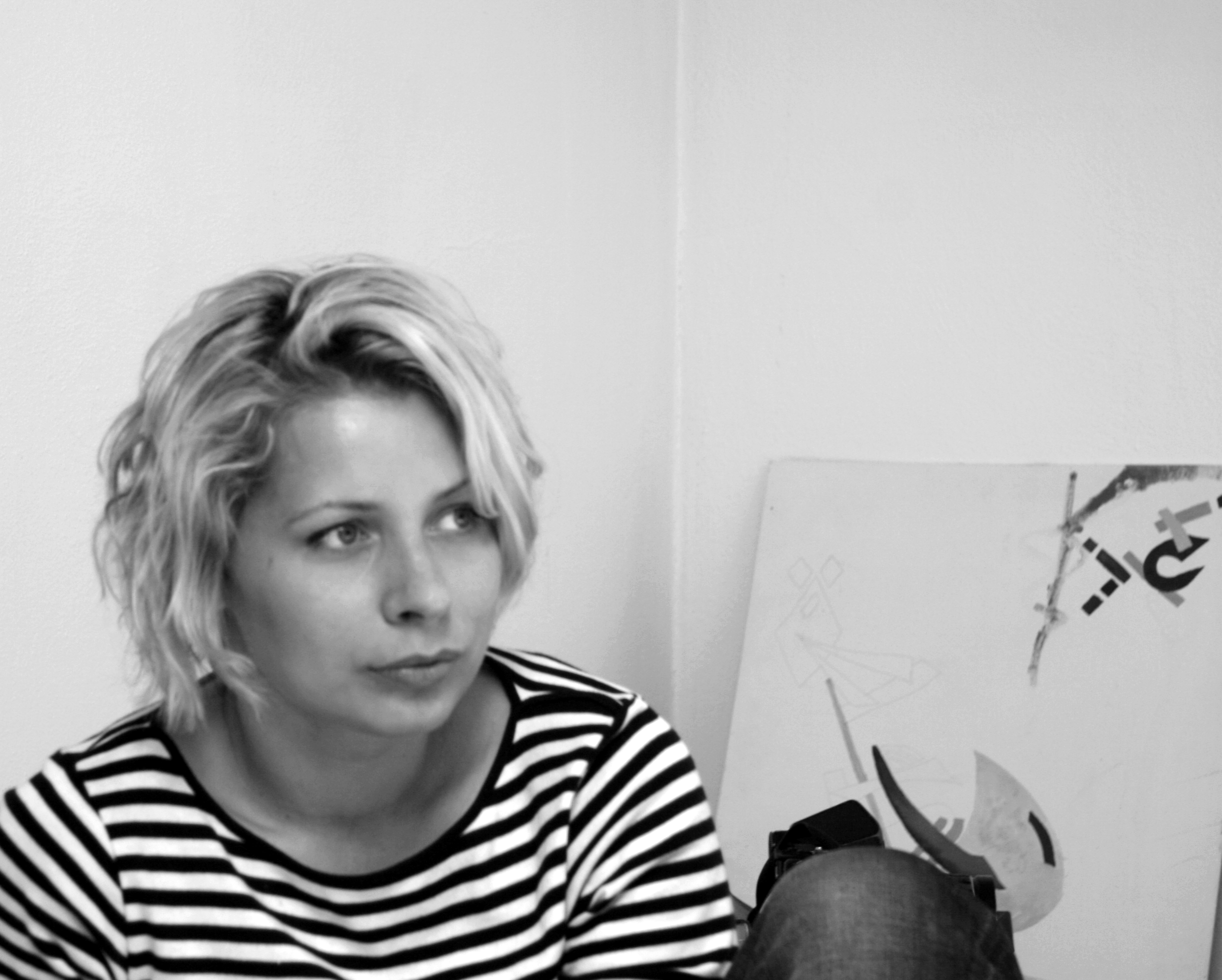 Tereza z Davle, fotografické dílo Portrét Terezy z Davle